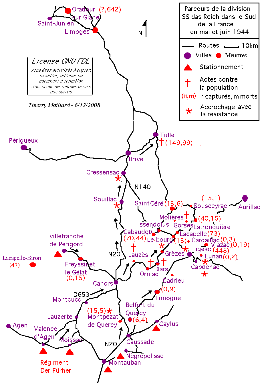 Report sur la carte du parcours de la division SS Das Reich dans le sud de la France en mai et juin 1944